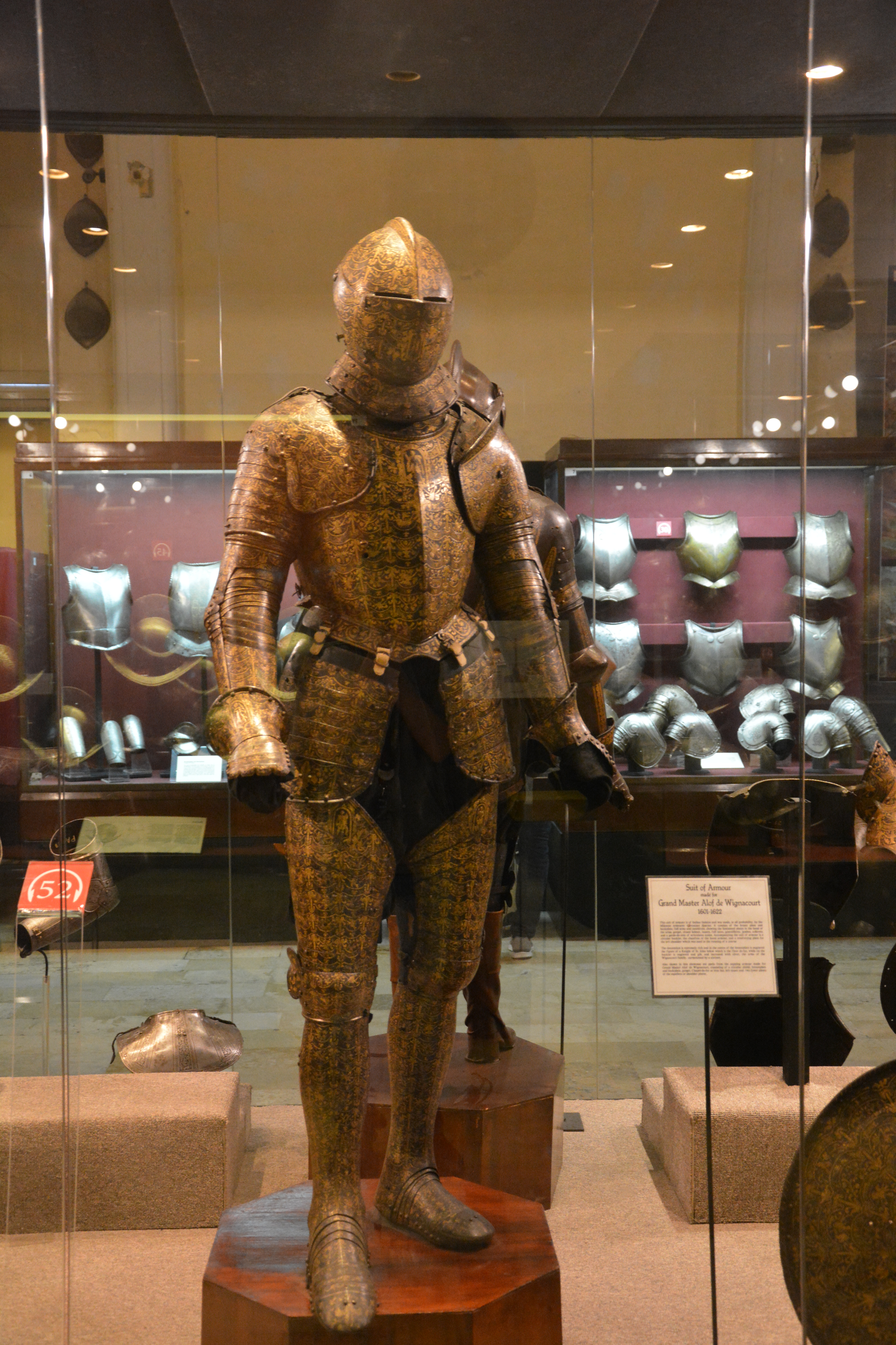 Armure de parade du Grand Maitre Alof de Wignacourt, dans l'armurerie du Palais, La Valette, Malte